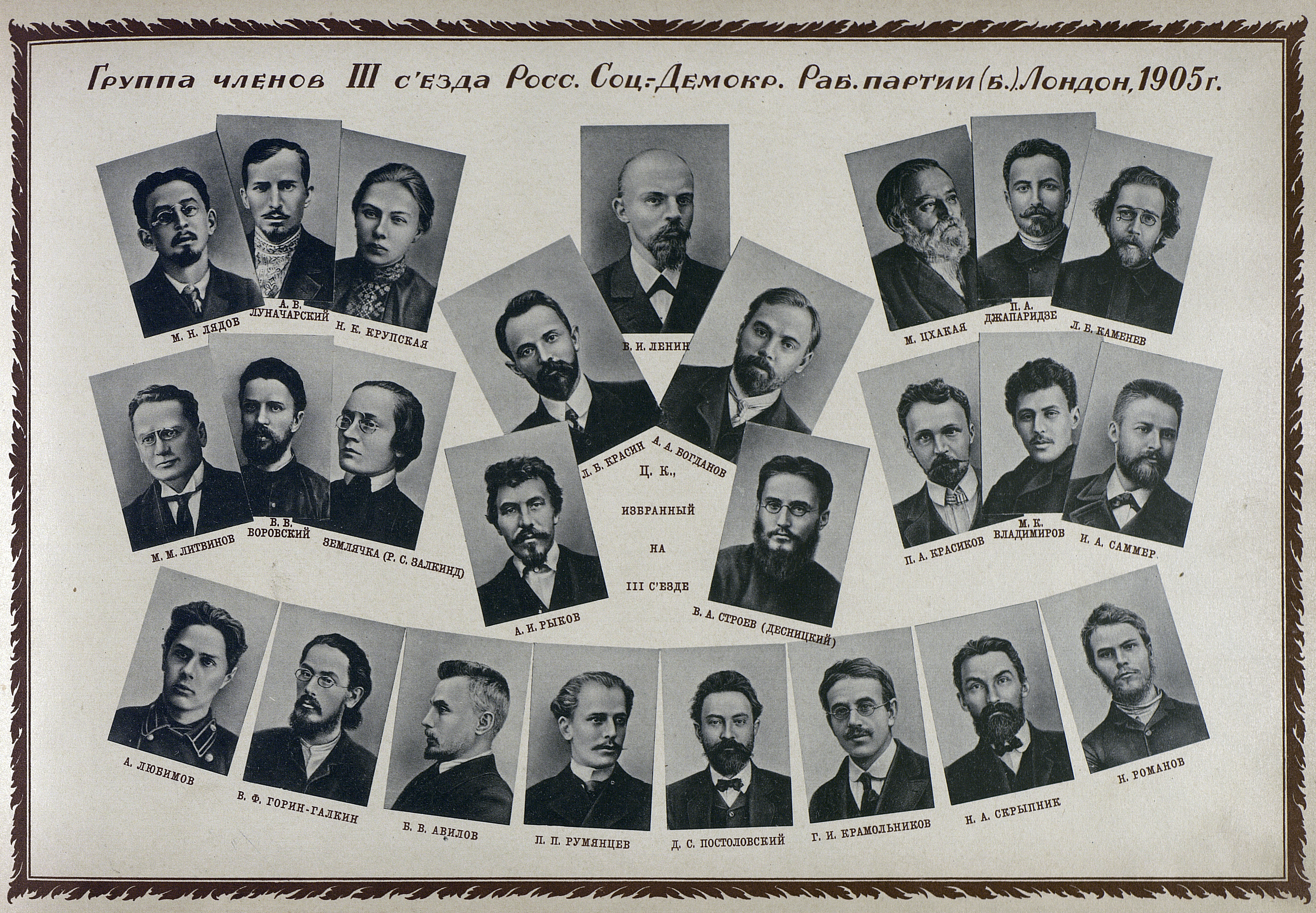 Участники 3-го съезда РСДРП (Лондон, 1905).